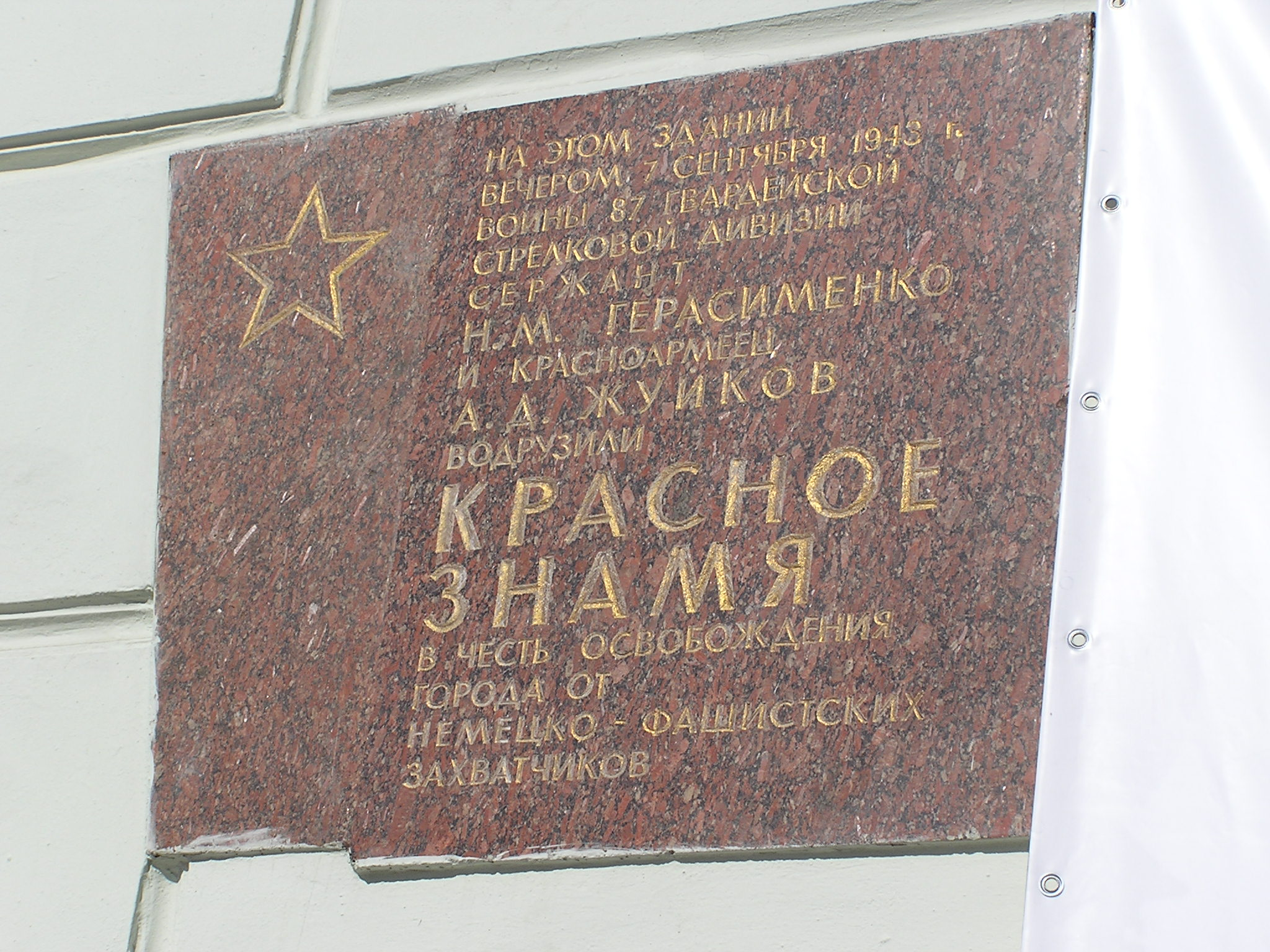 мемориальная табличка в Донецке